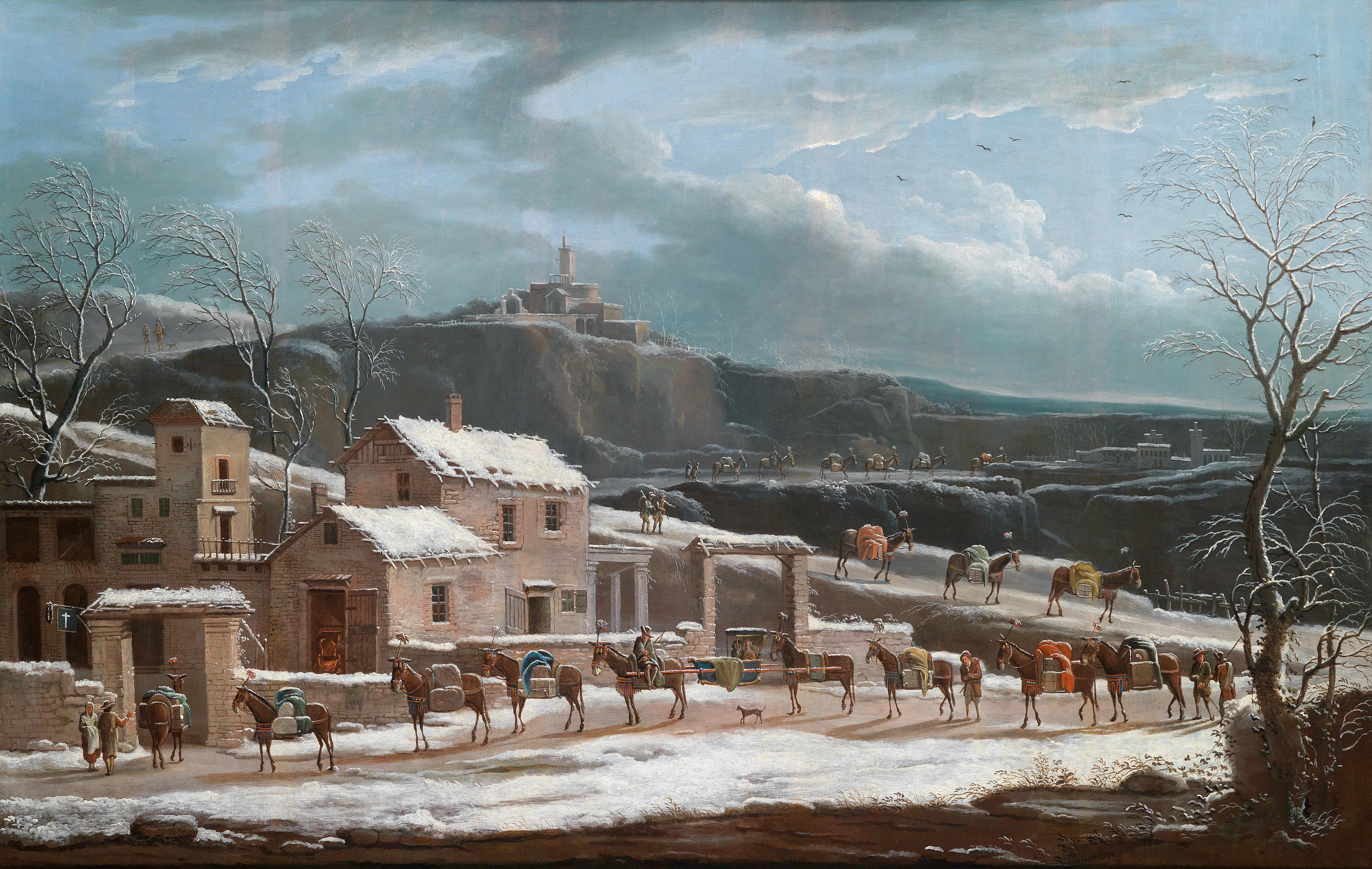 Eine Winterlandschaft mit Händlerkarawane, Öl auf Holz, 73 x 112 cm